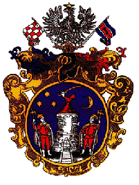 Grb Plemenite opčine turopoljske